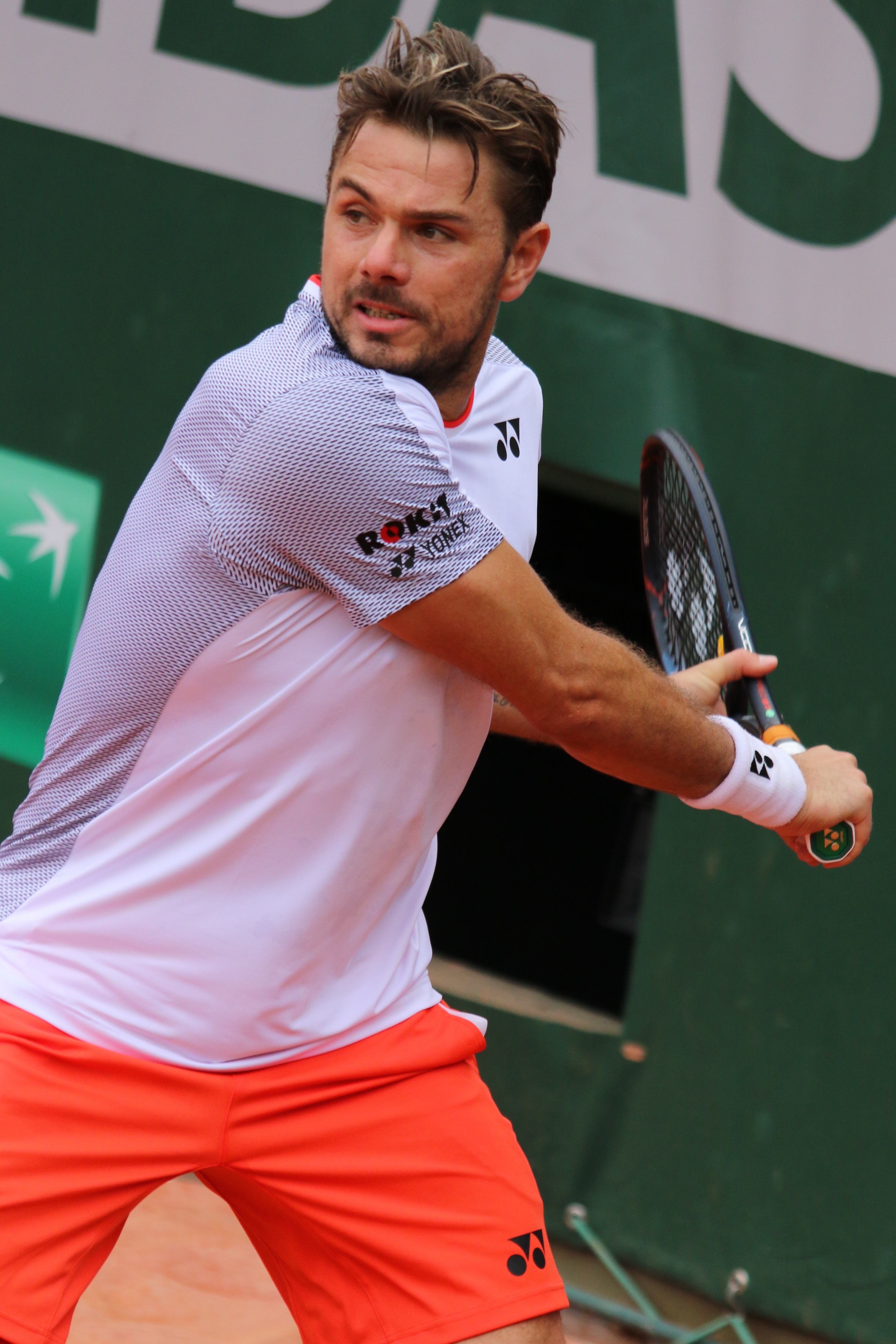 Wawrinka RG19 (16)